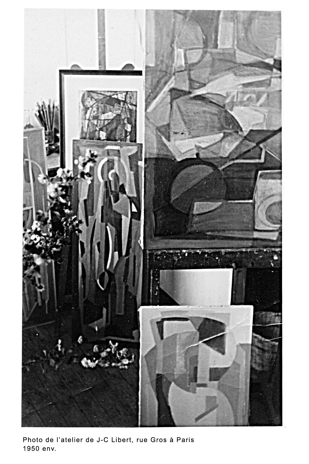 C'est dans cet atelier à Paris, proche de la galerie de Colette Allendy qu'il fréquentait souvent, que Jean-Claude Libert a réalisé ses oeuvres post-cubistes , marqué par ses rencontres avec Veira da Silva, Albert Gleizes, Sonia Delaunay, Gilioli, Etienne Martin...